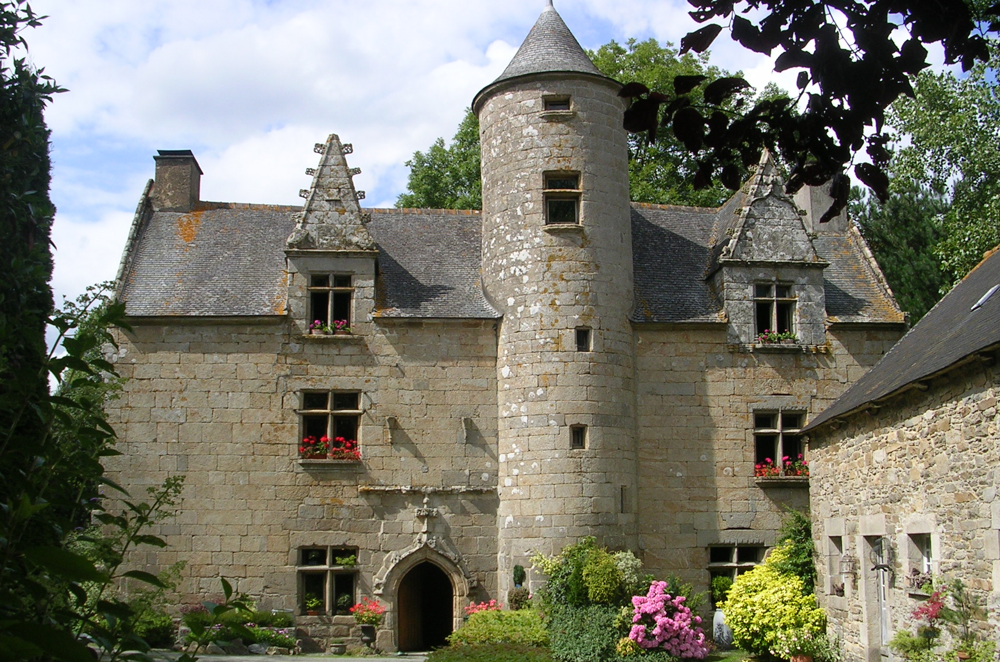 Manoir de Toul an Golet à Plésidy